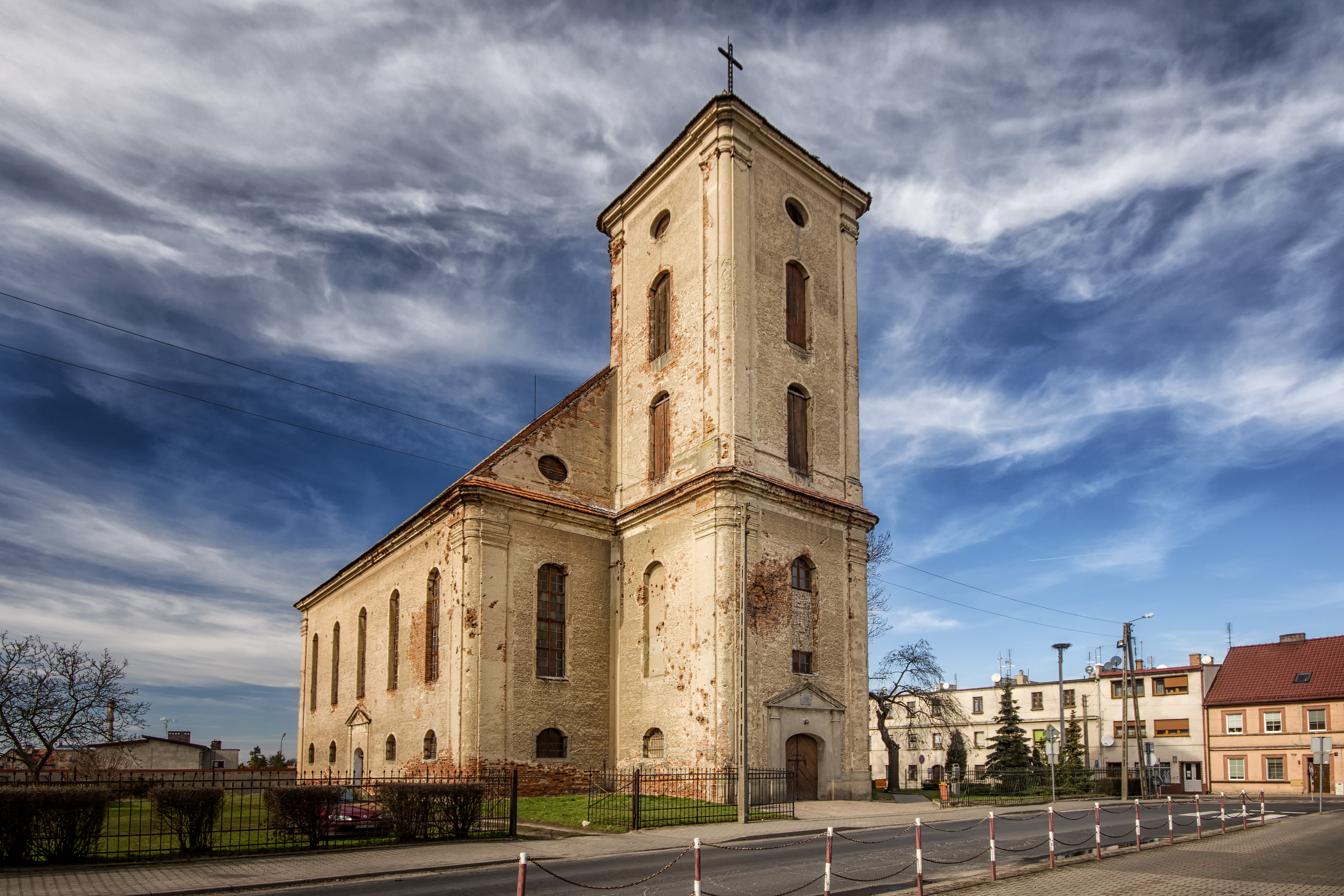 Zduny, kościół ewangelicki, ob. dom pogrzebowy, 1791-1792, 1990